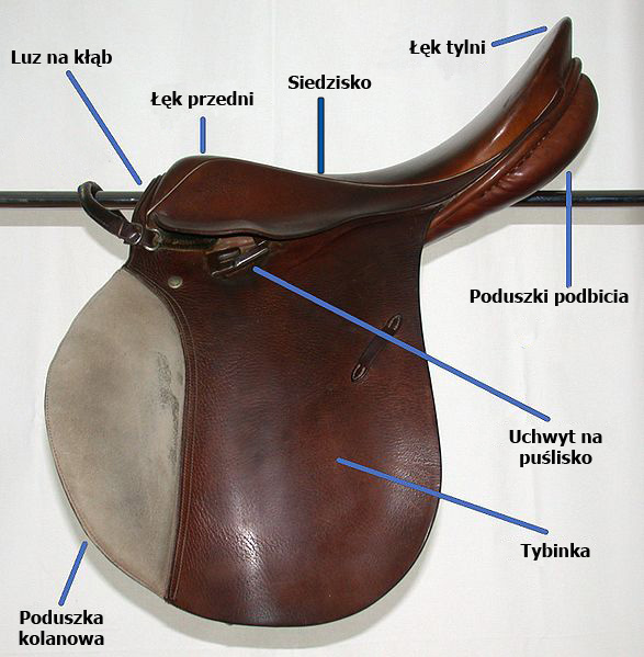 Schemat części siodła angielskiego